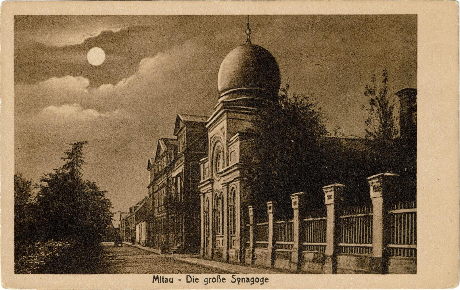 Mondscheinansichtskarte Mitau, Große Synagoge